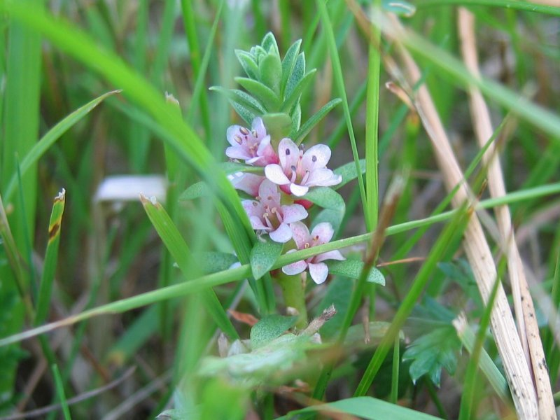 Strand-Milchkraut Glaux maritima, Zingst